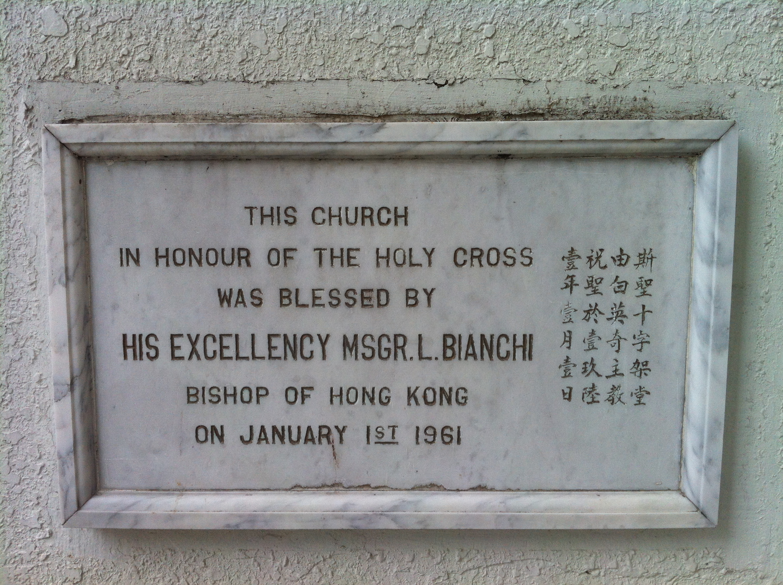 中文（香港）: 聖十字架堂, 香港, 中國